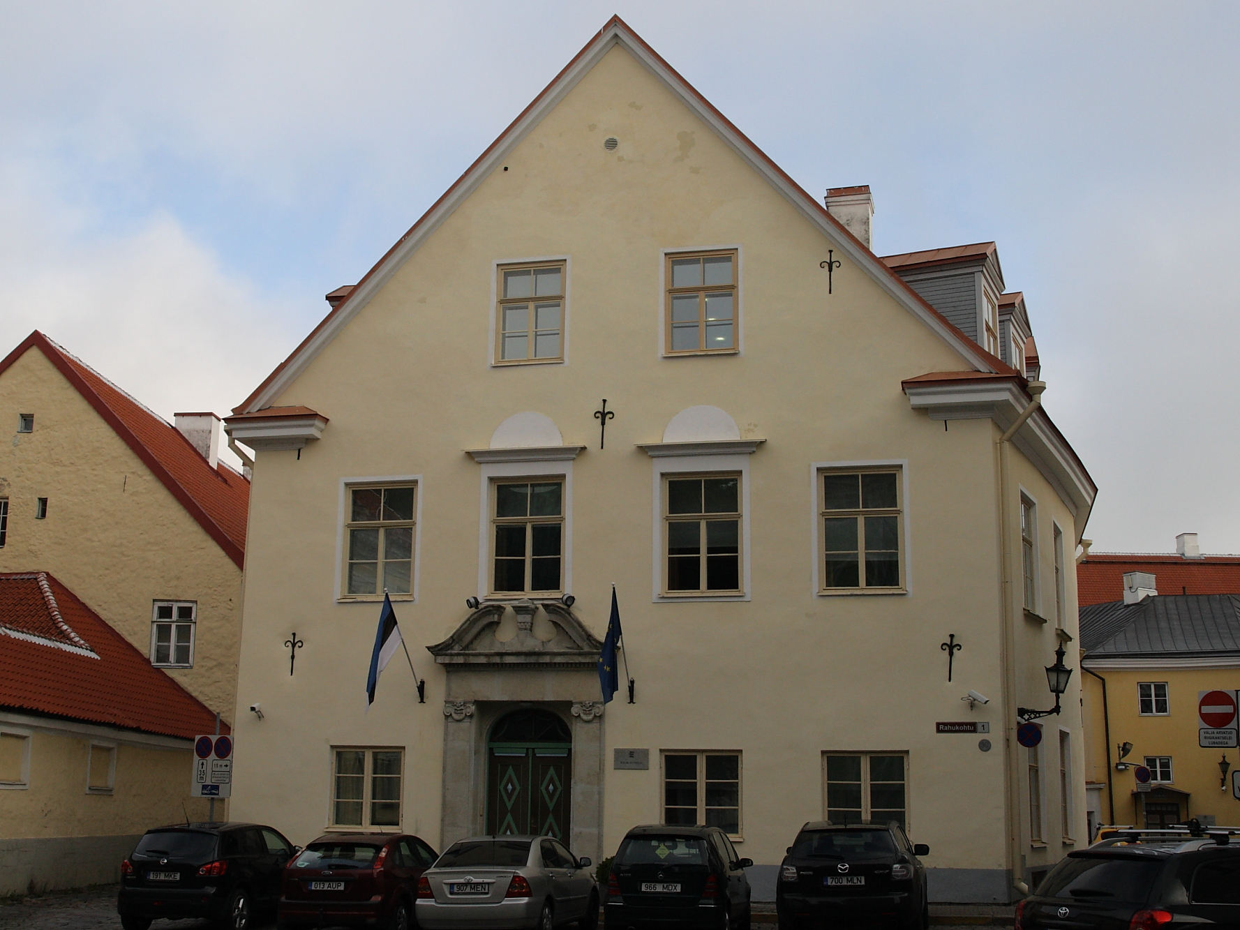 Tallinn, elamu Rahukohtu 1, 17.-20.saj